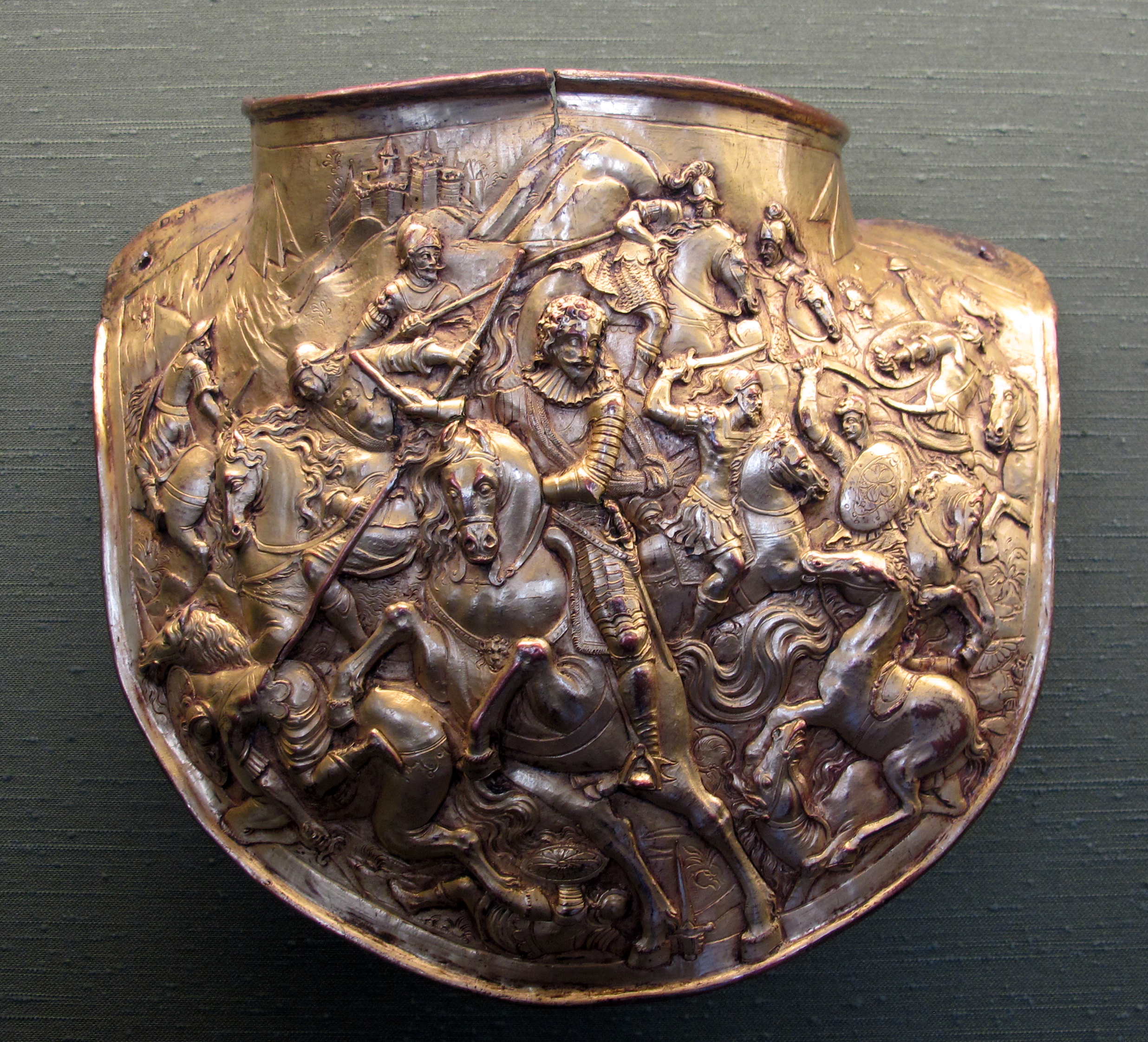 Musée d'art et d'histoire de Genève